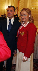 Анастасия Ермакова с Президентом России